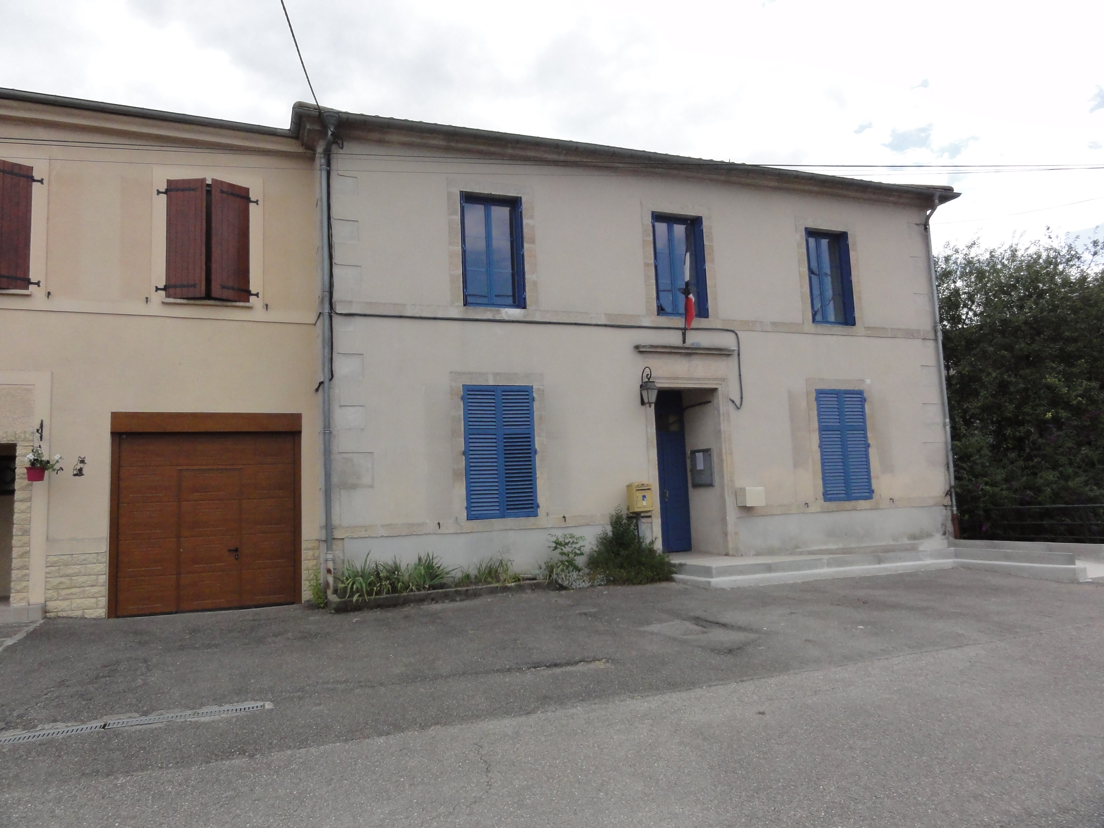 Culey (Meuse) mairie